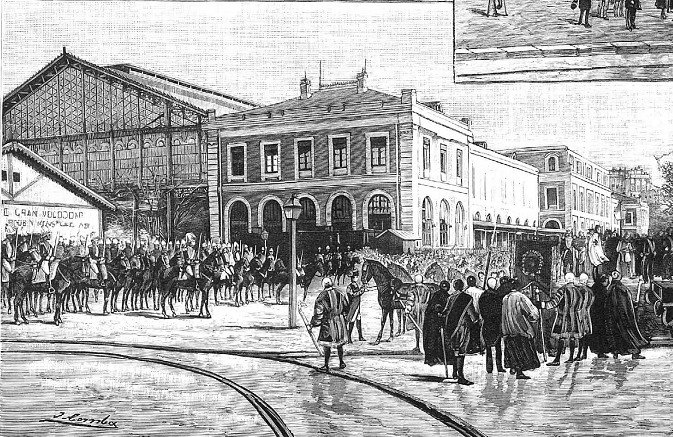 De Madrid al Escorial, 1) Paso por la casa de campo del tren fúnebre, 2) Llegada a la estación de Villalba, 3) Colocación del coche-estufa sobre la plataforma de un furgón, en el muelle de carga y descarga de la Estación del Norte de Madrid, grabado publicado en la revista española La Ilustración Española y Americana.